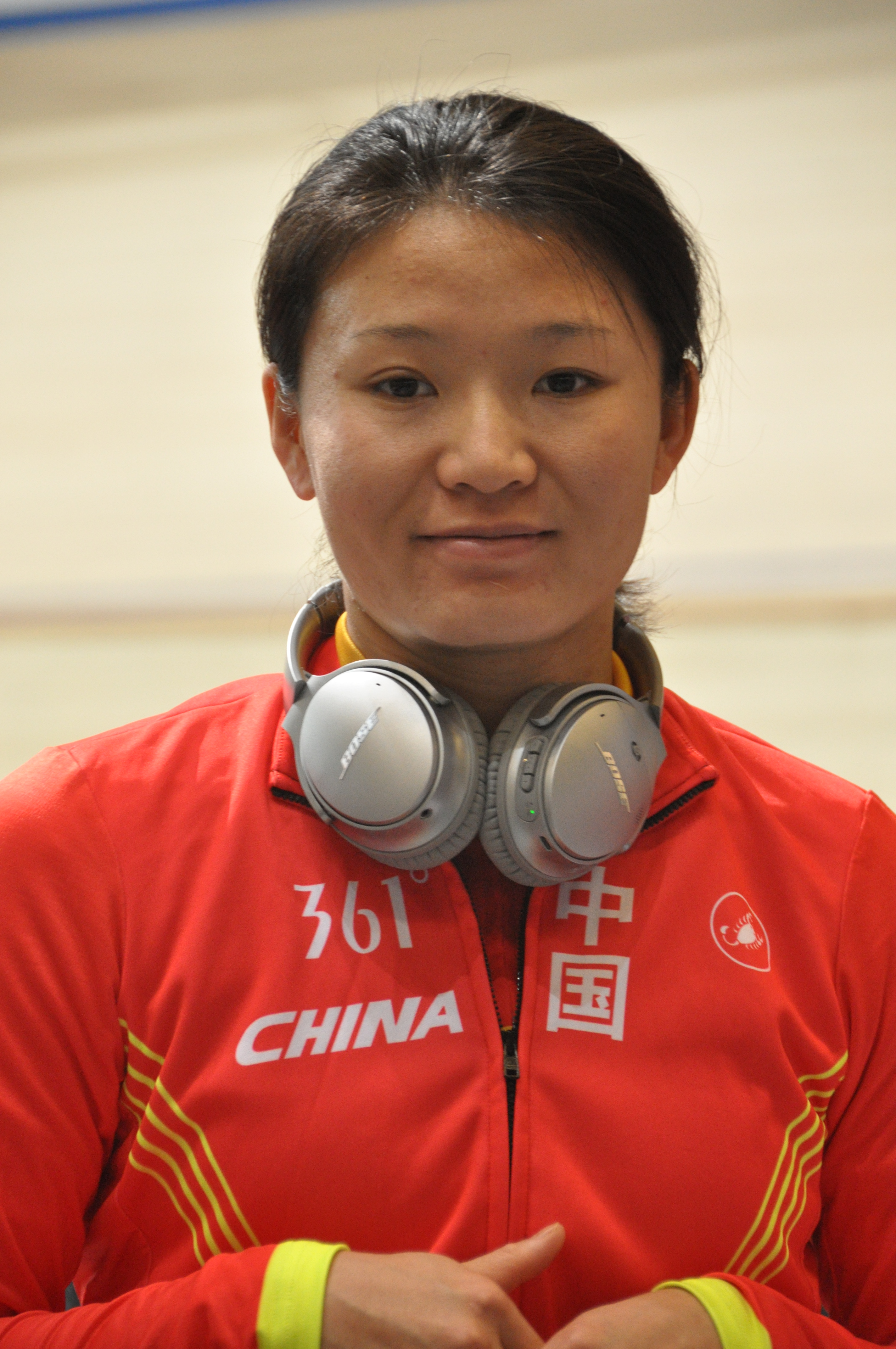 Luo Xiaoling, chinesische Radsportlerin